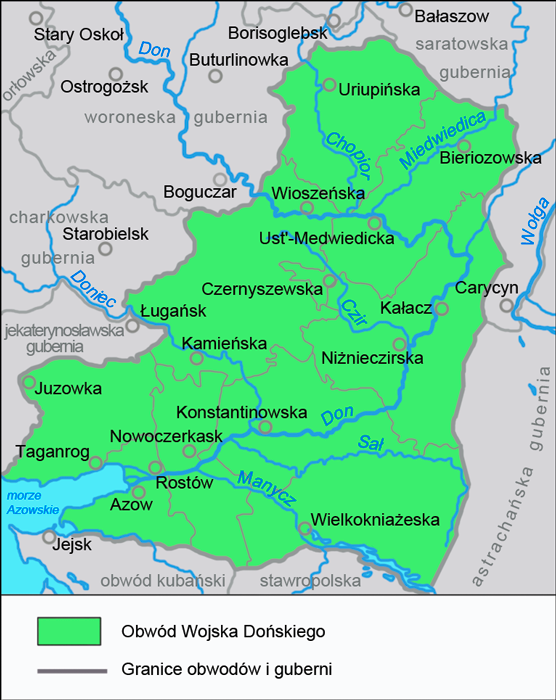 Obwód Wojska Dońskiego na początku XX wieku. Źródło: Brockhaus and Efron Encyclopedic Dictionary b54 360-1.jpg